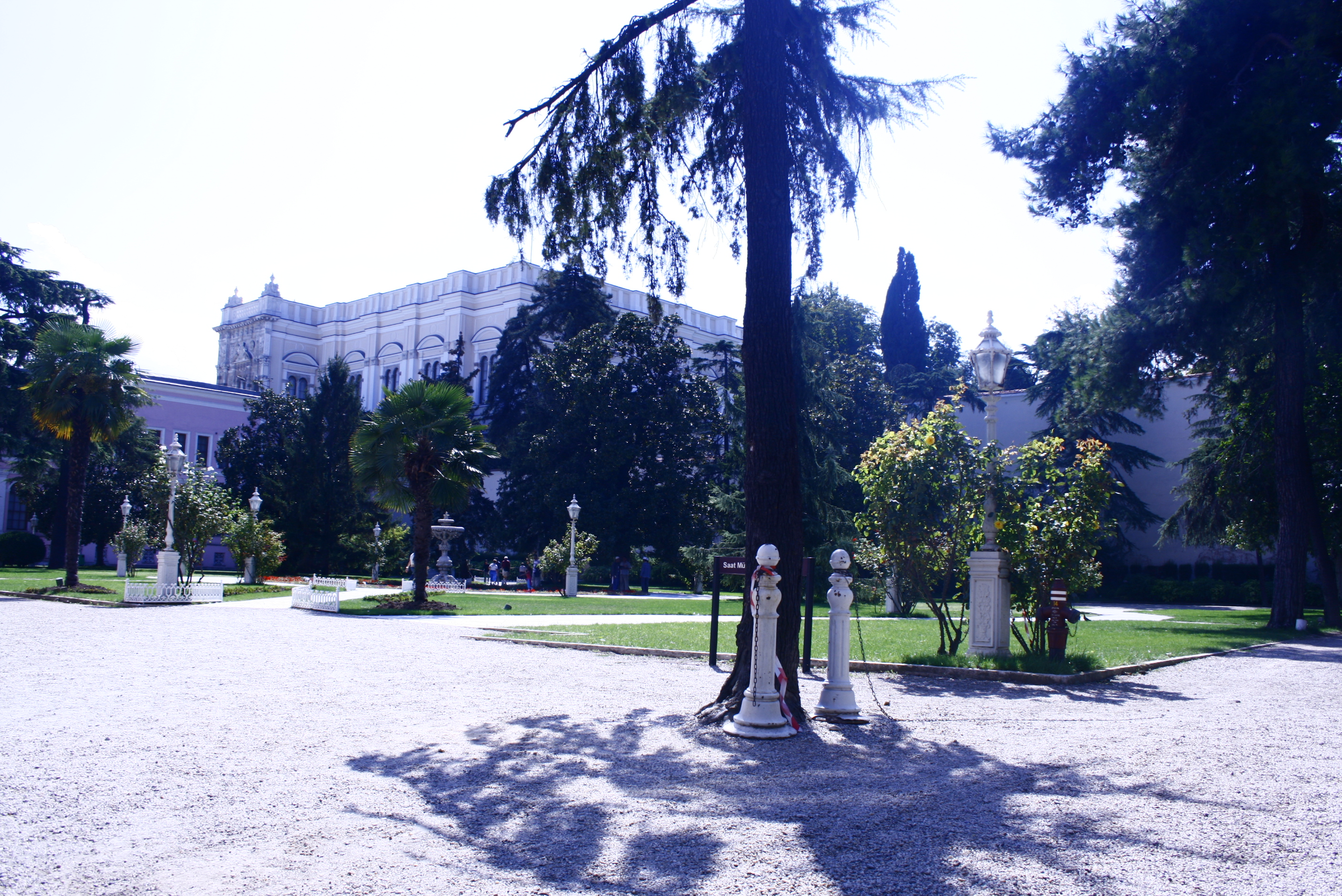 Der landseitige Garten des Harems